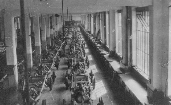 Montagehalle der Ateliers Piccard-Pictet & Cie. in Genf für die Montage der Chassis der Automarke Pic-Pic ca. 1920